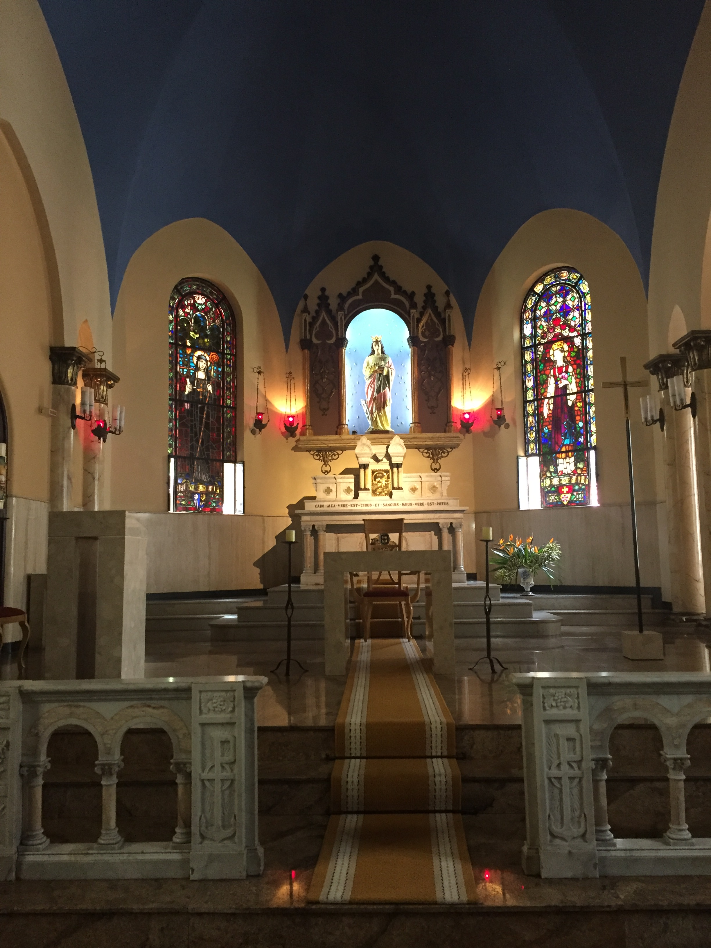 Capela do Acervo Histórico Irmã Beata Heinrich, em São Paulo (SP), Brasil.